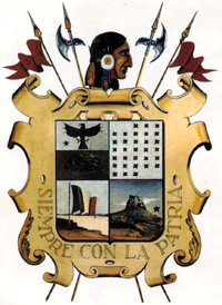 Escudo de nuevo laredo Tamaulipas, México.